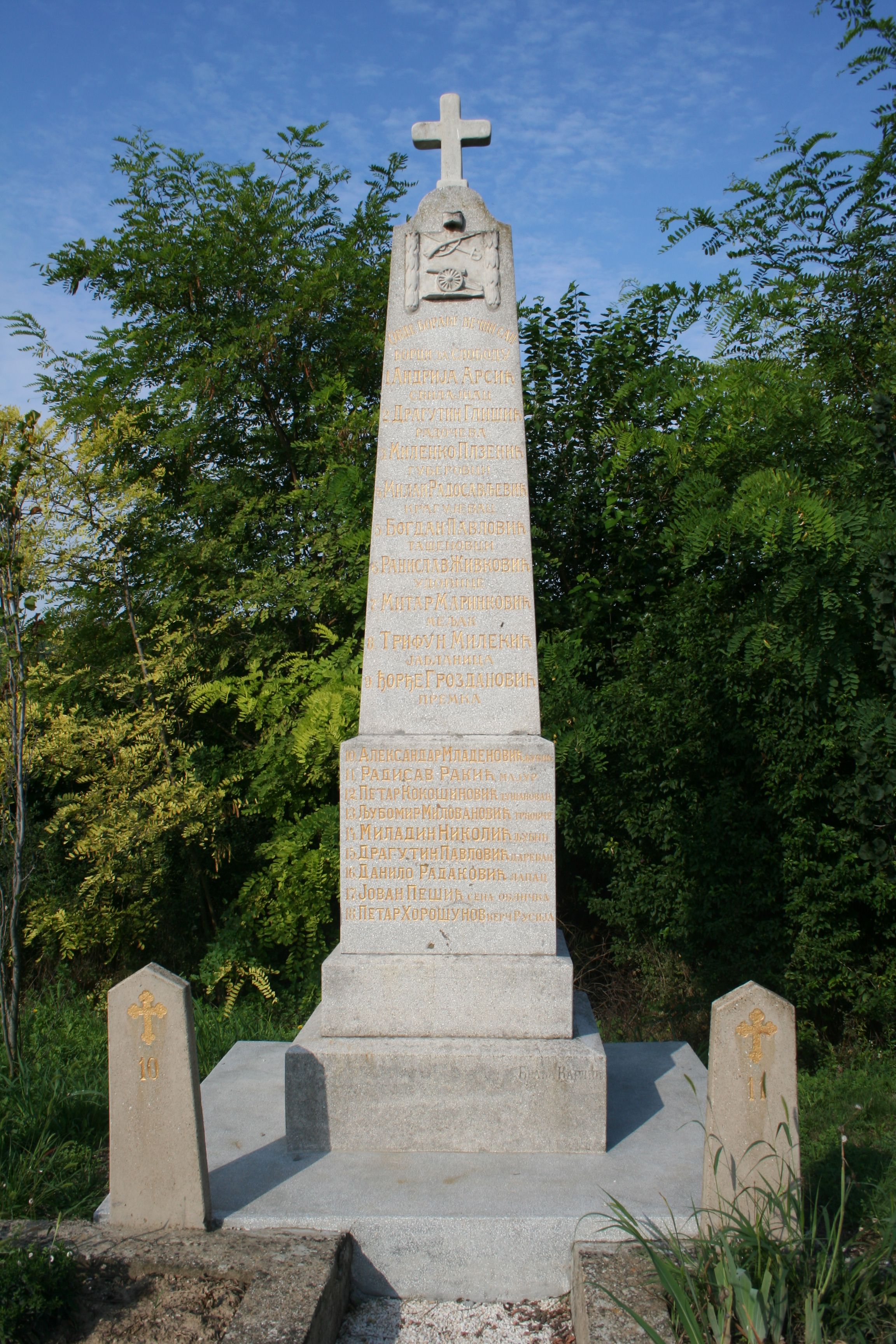 Spomenici ratnika iz I Svetskog rata i boraca II Svetskog rata